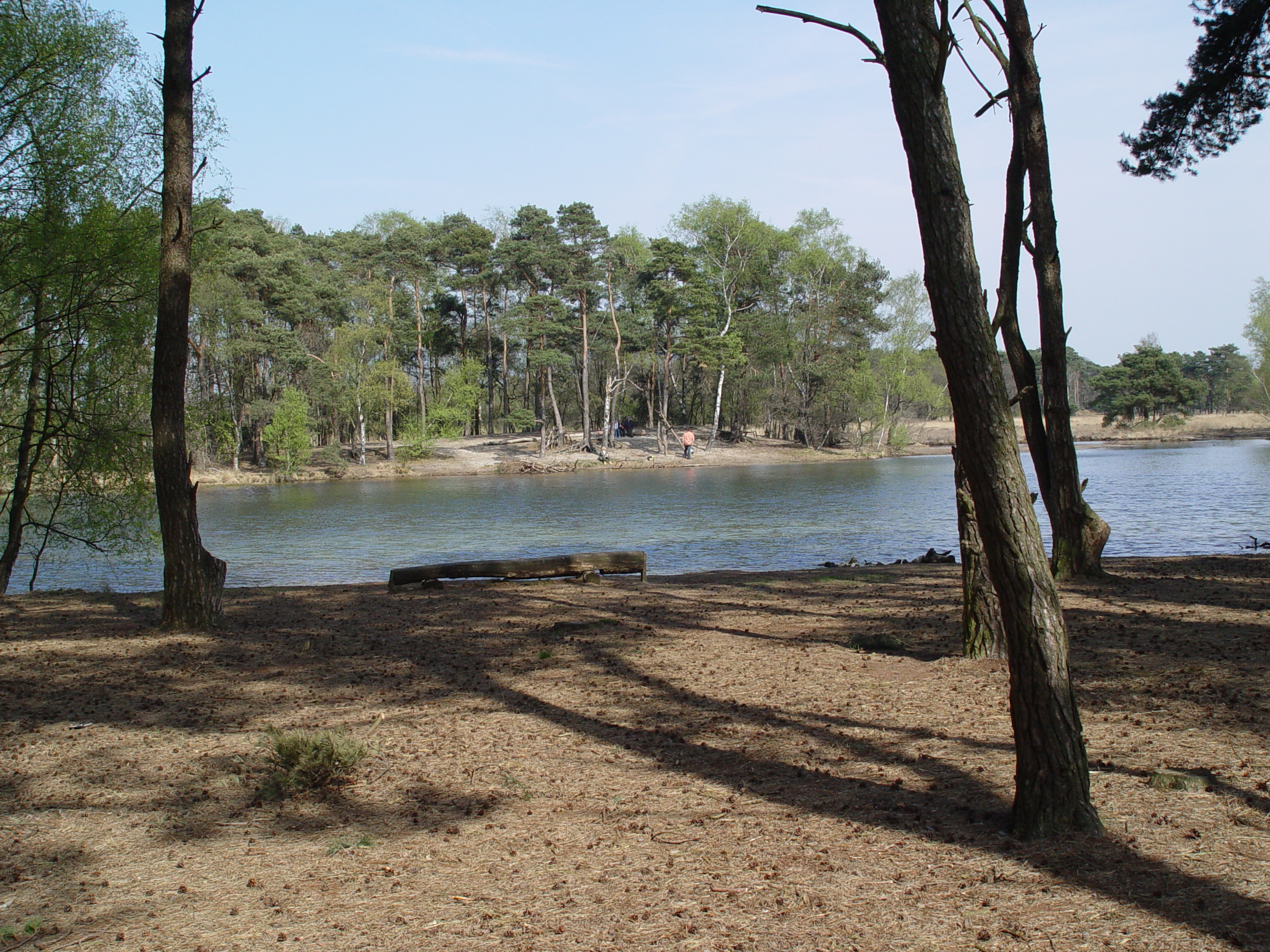 Buursermeertje